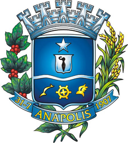 Brasão Municipal da Cidade de Anápolis